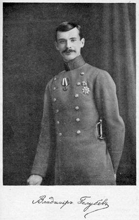 Cтудент Владимир Голубев - человек, который "изобрел" виновность Бейлиса Student Vladimir Golubev, leader of black hundred organisation "Two-headed eagle" - the person who "has invented" guilt of Beilis